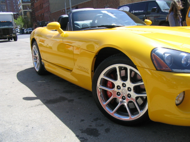 Automobile Pictures-Dodge Viper SRT-10